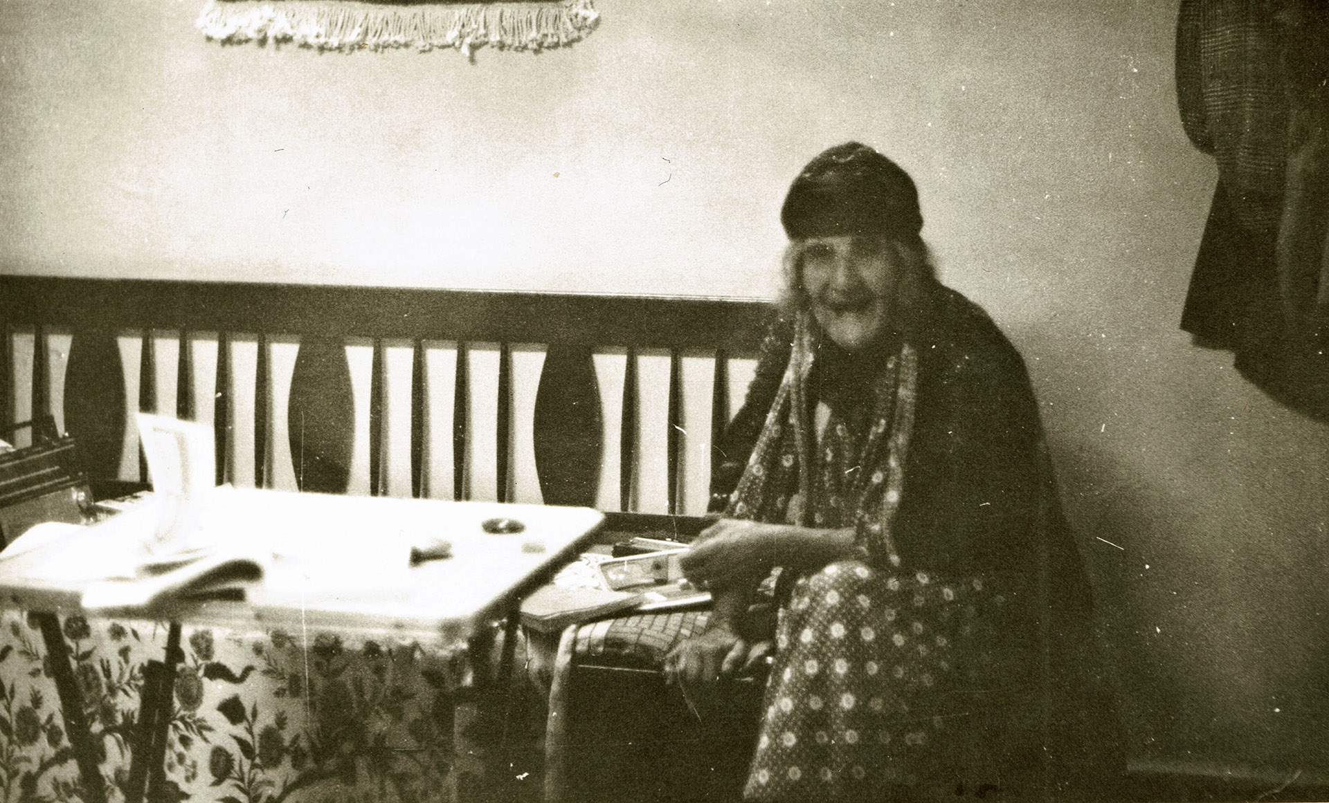 کوردی: خەیرییە ئەیوب غەیوب خێزانی گۆگۆل جاند مکورجی